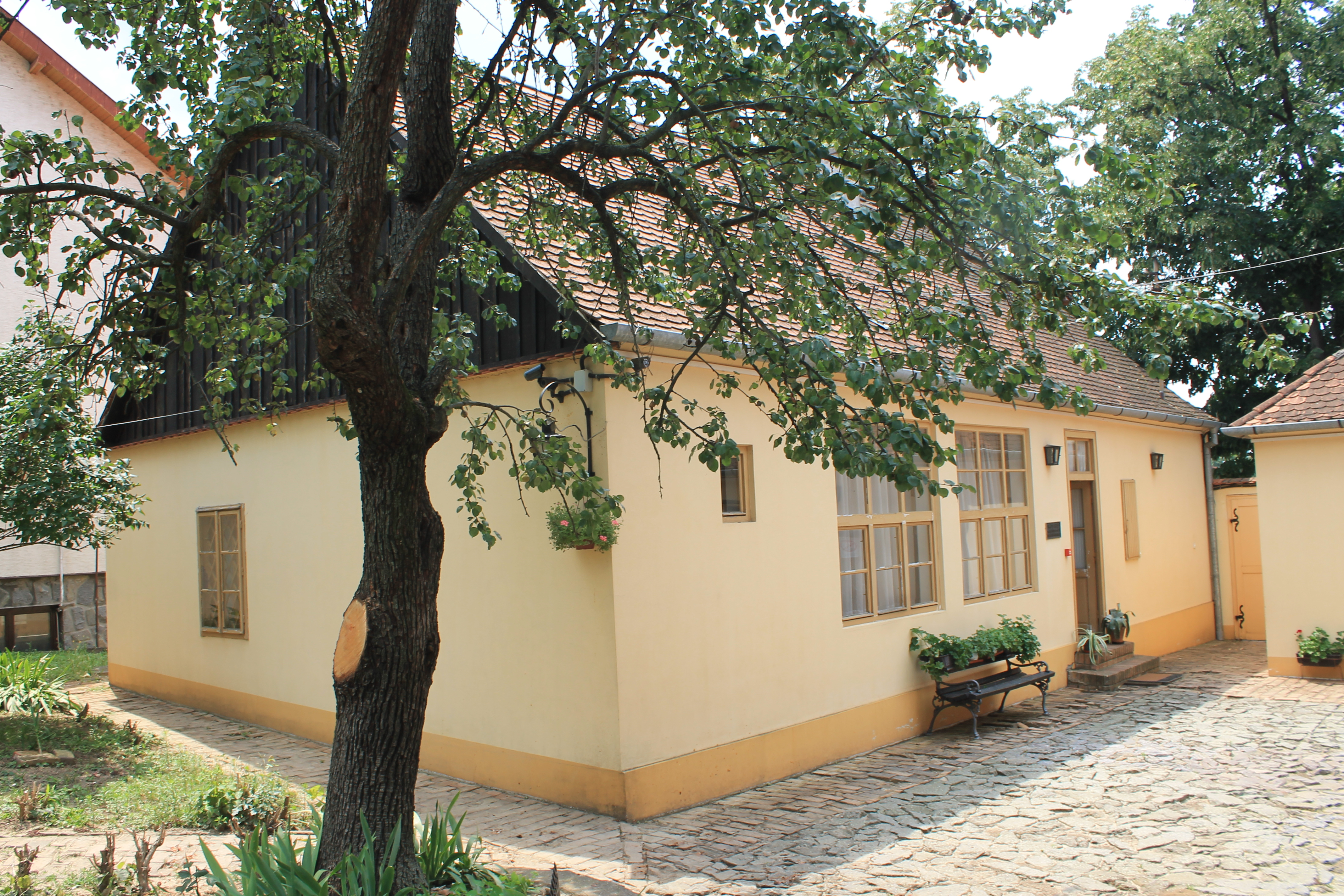 Kuća u kojoj je živeo Jovan Jovanović Zmaj u Sremskoj Kamenici